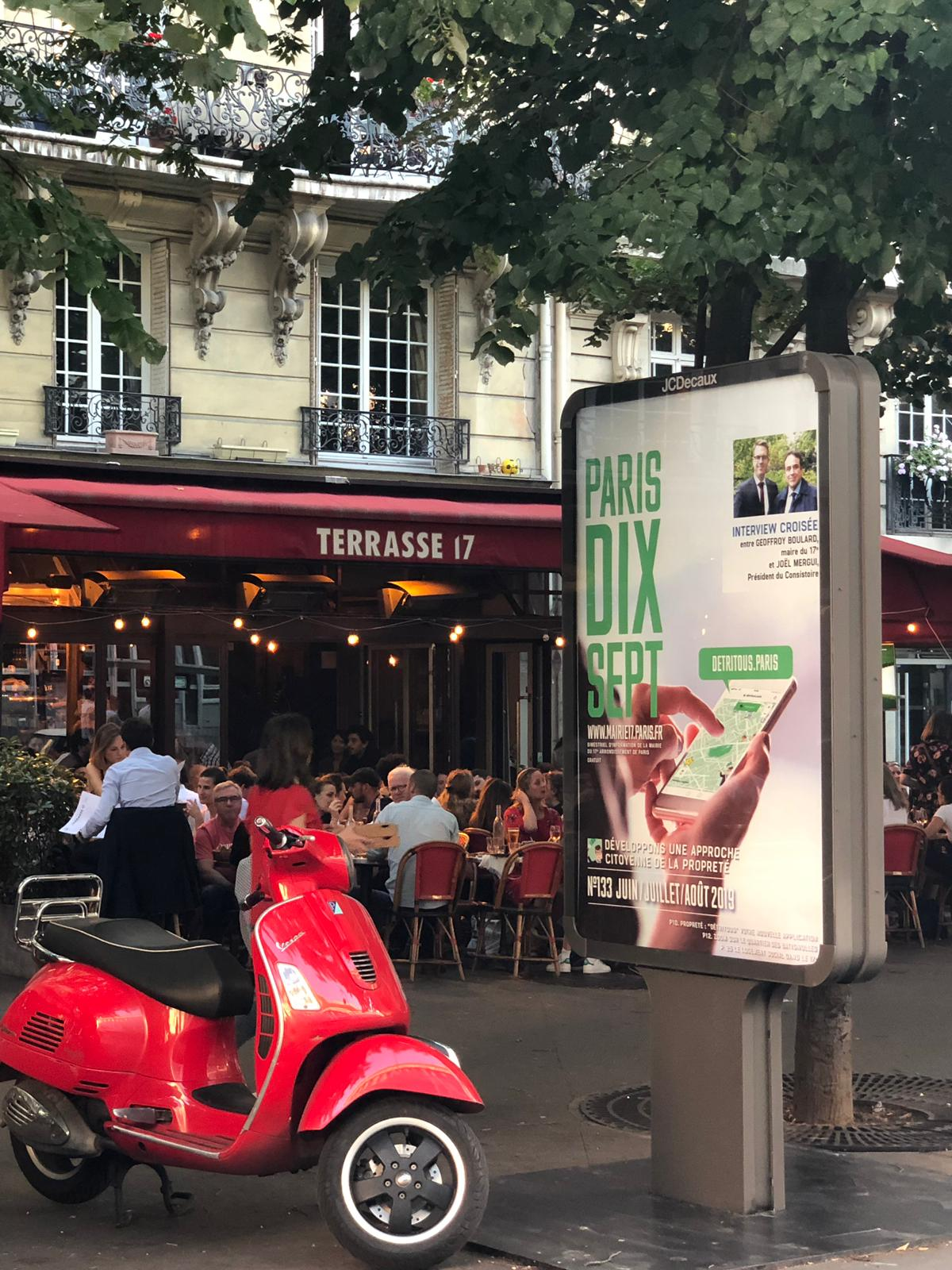 Place Richard-Baret, une publicité de rue présente le jeu Détritous.